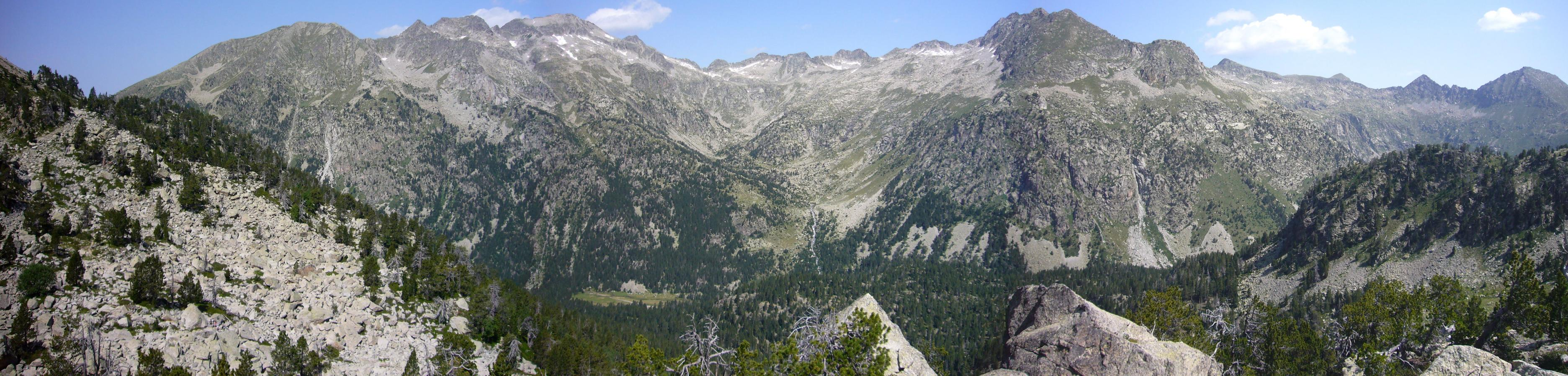 Vall de Contraix vista des de la Vall de les Corticelles; la Vall de Boí, Alta Ribagorça, Catalunya